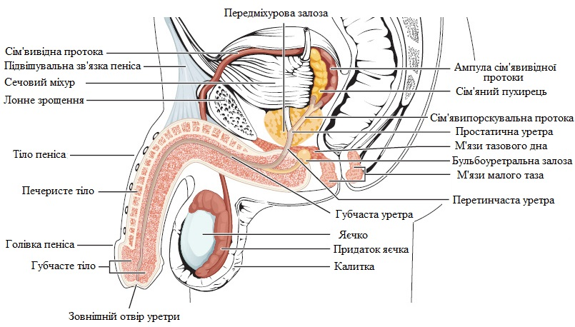 Зображення будови чоловічого статевого члена з навколишніми органами. Україномовну версію виконано на основі англомовної